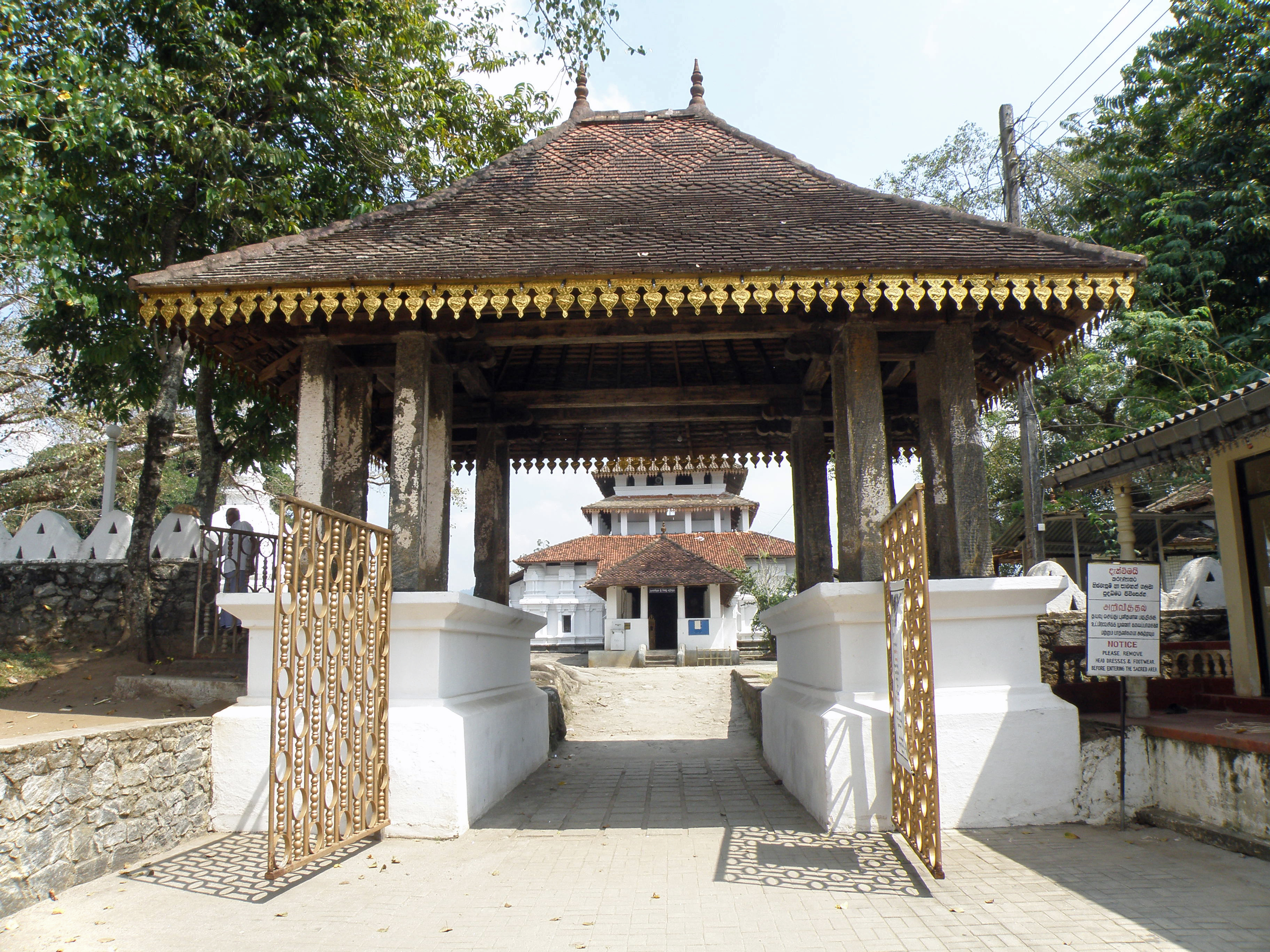 Portail à l'entrée du site de Lankathillaka Vihara